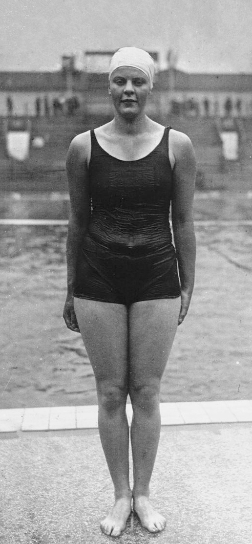 Les Tourelles : Championnats d'Europe : Melle Kastern (Hollande) (portrait à 3 m) : [photographie de presse] / Agence Meurisse